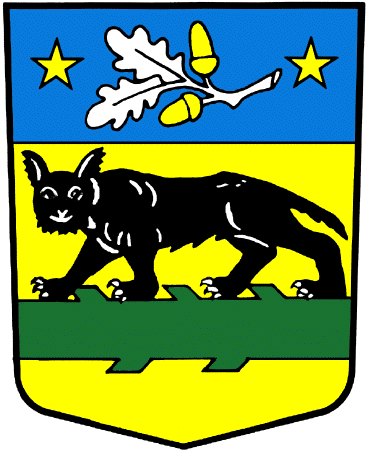 Wappen von Charrat Kanton Wallis